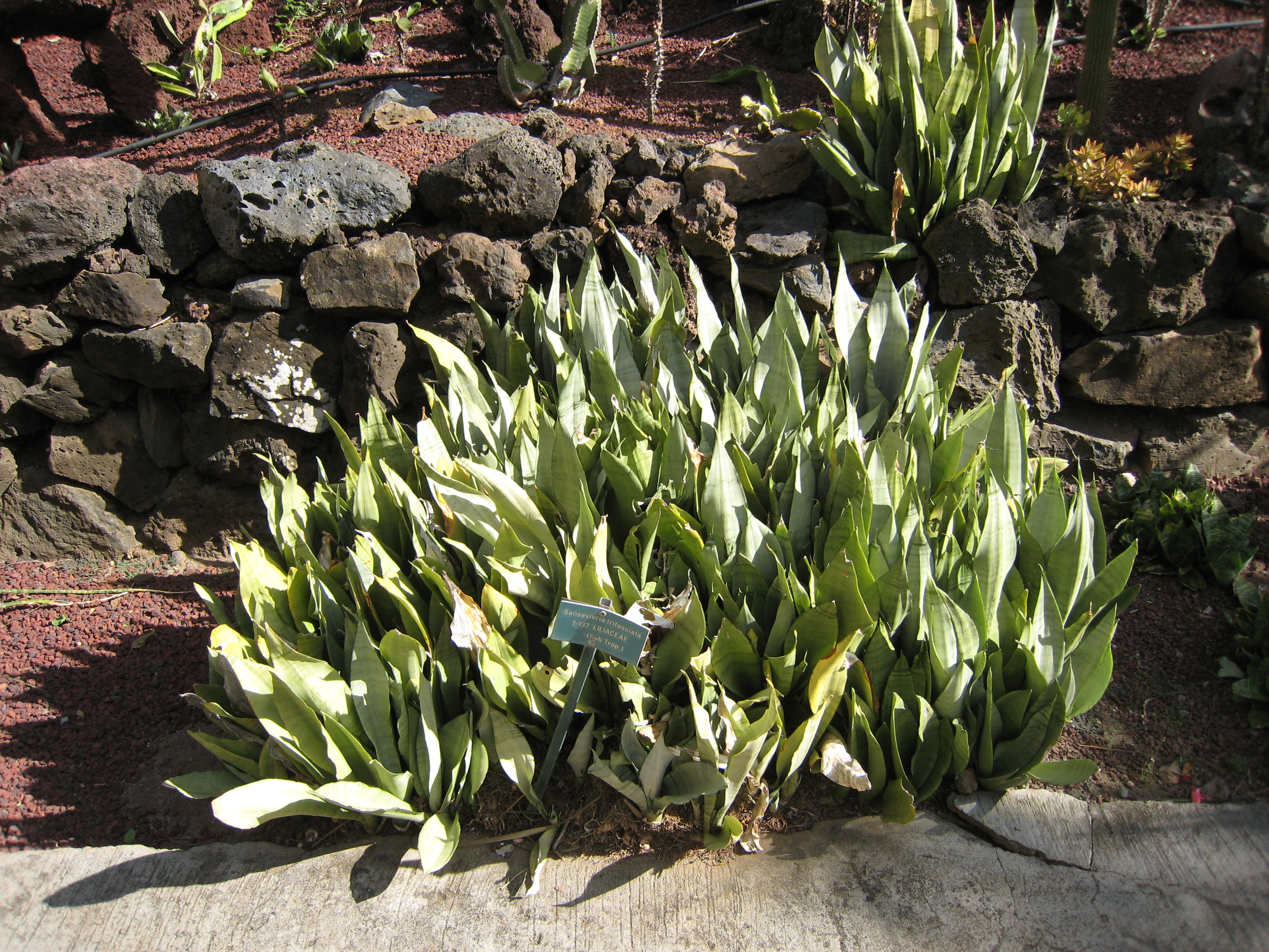 Sansevieria trifasciata au Jardin d'Éden de Saint-Paul, sur l'île de La Réunion.